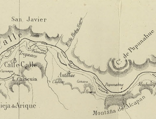 De Calle Calle a Pupunahue en el Mapa de la Expedicion de Francisco Vidal Gormaz 1869